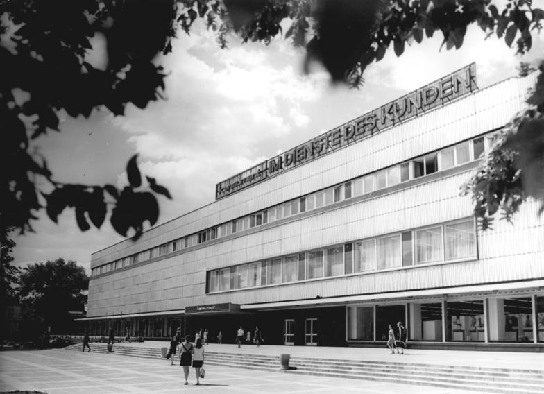 Cottbus, Warenhaus ADN-ZB Deutsche Demokratische Republik 3.8.1972 cu Cottbus: Im Dienste des Kunden steht dieses Warenhaus, die modernste Einkaufsstätte für die Cottbuser Bevölkerung. Reporter: Schutt Copyright: ADN-Zentralbild